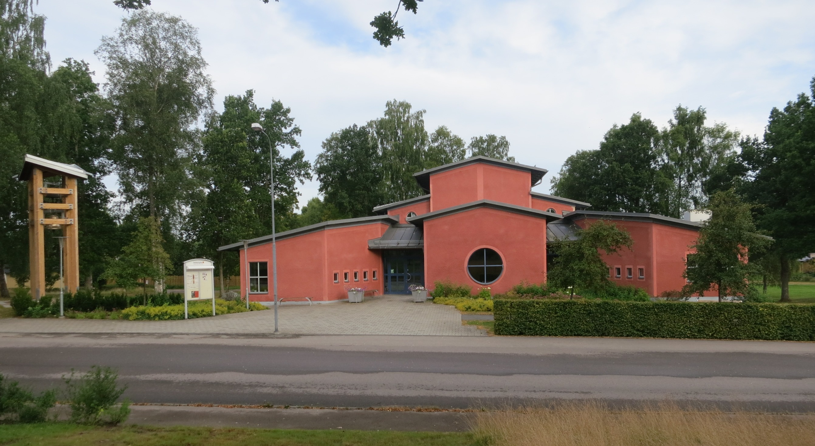 Mariakyrkan i Ljungby i Kronobergs län i Småland